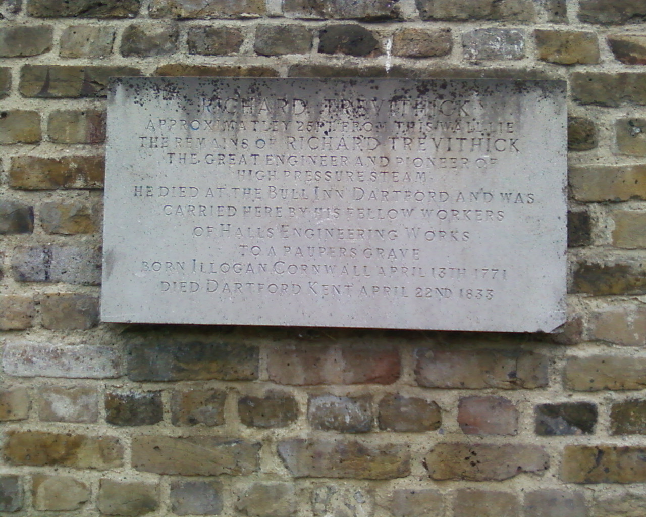 A memorial.